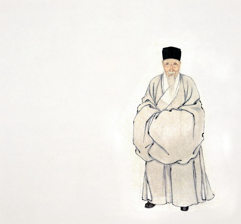 陈继儒，字仲醇。为诸生，与董其昌齐名。年二十九，取儒衣冠焚弃，隐居东佘山。大臣论荐，屡征不起，年八十二卒。